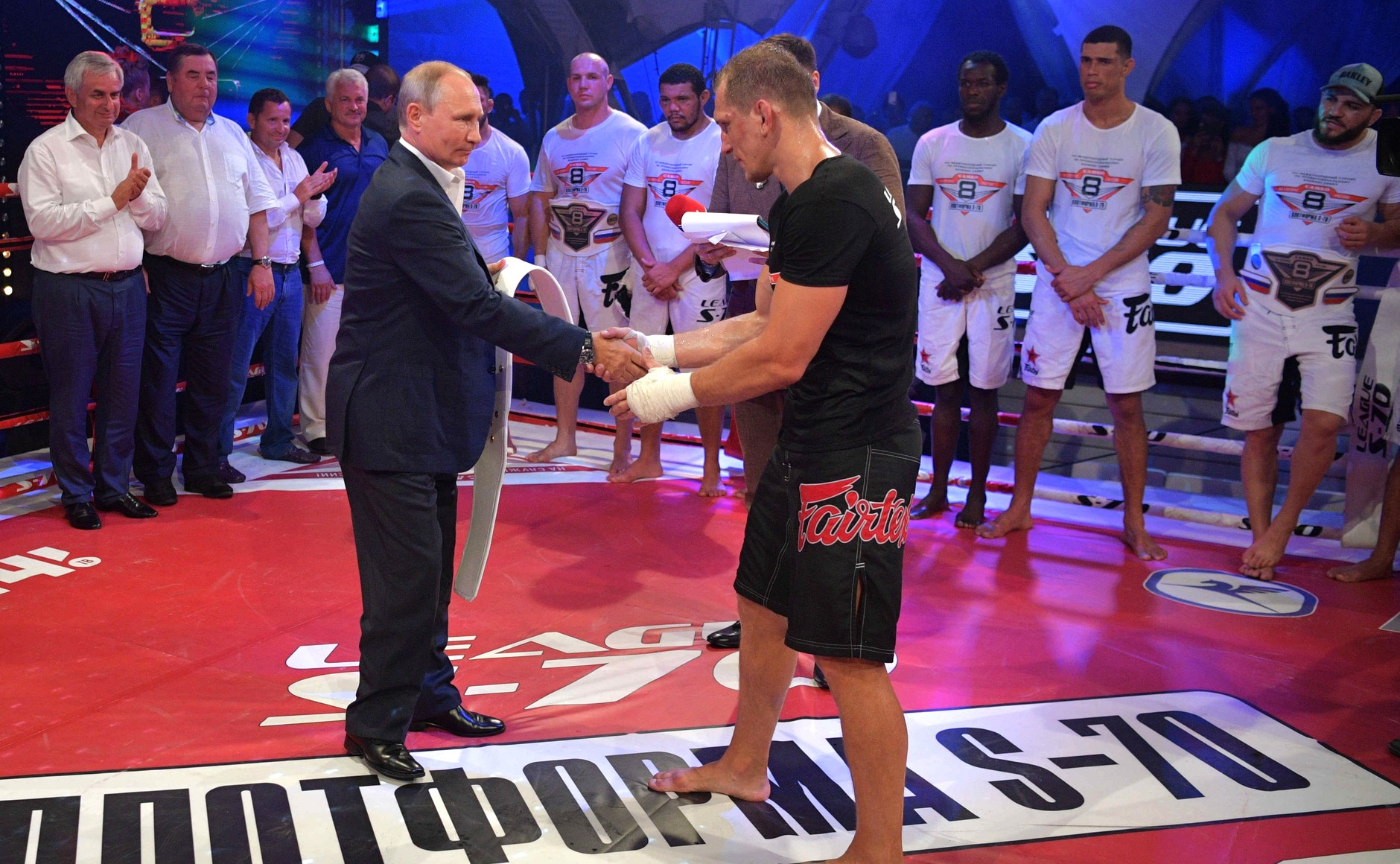 В.Путин вручил награду победителю VIII Международного турнира по профессиональному боевому самбо «Плотформа S‑70» по версии «Лиги S‑70» в весовой категории до 84 килограммов Вячеславу Василевскому